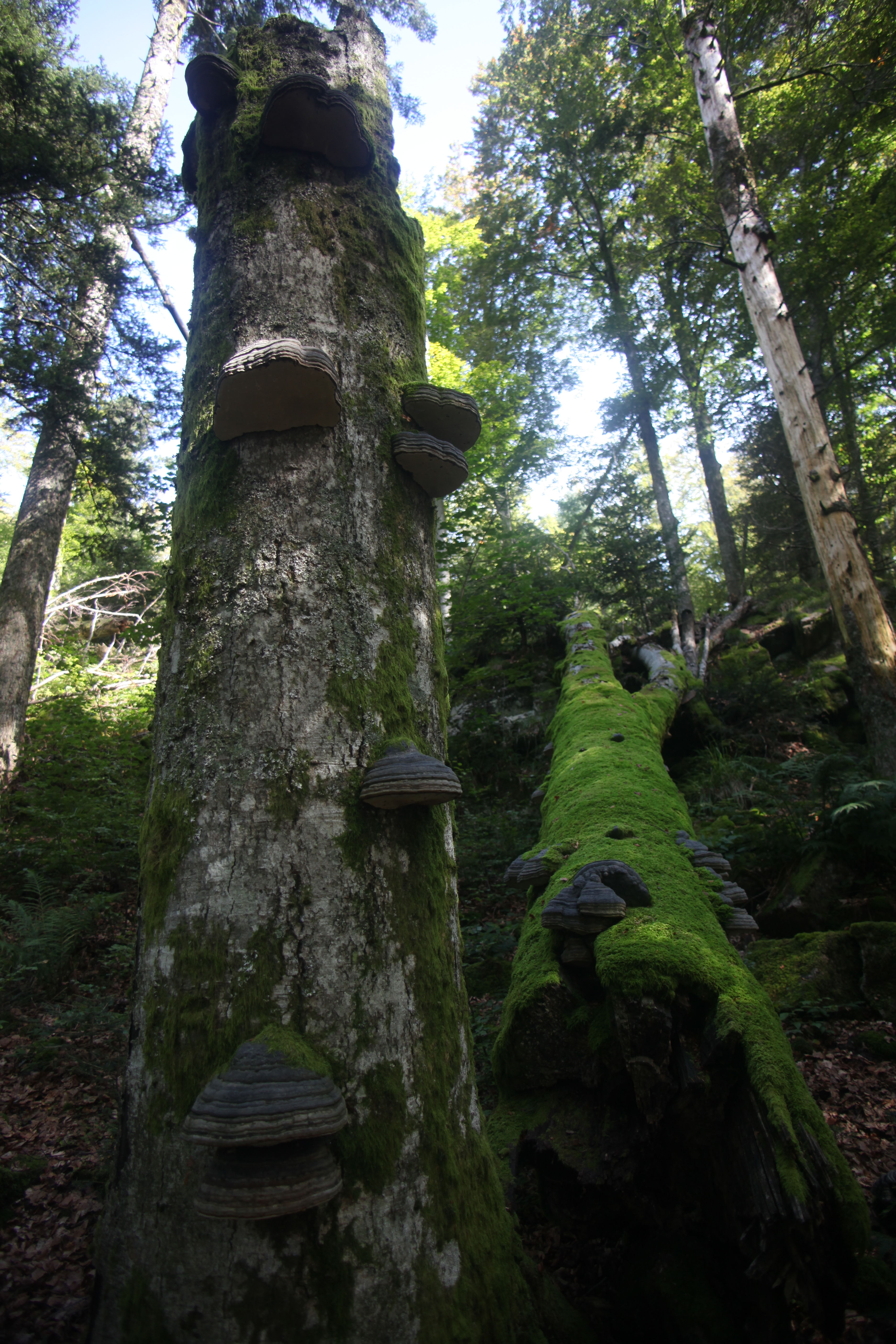 Des troncs moussus dans la réserve biologique intégrale des Ballons comtois.